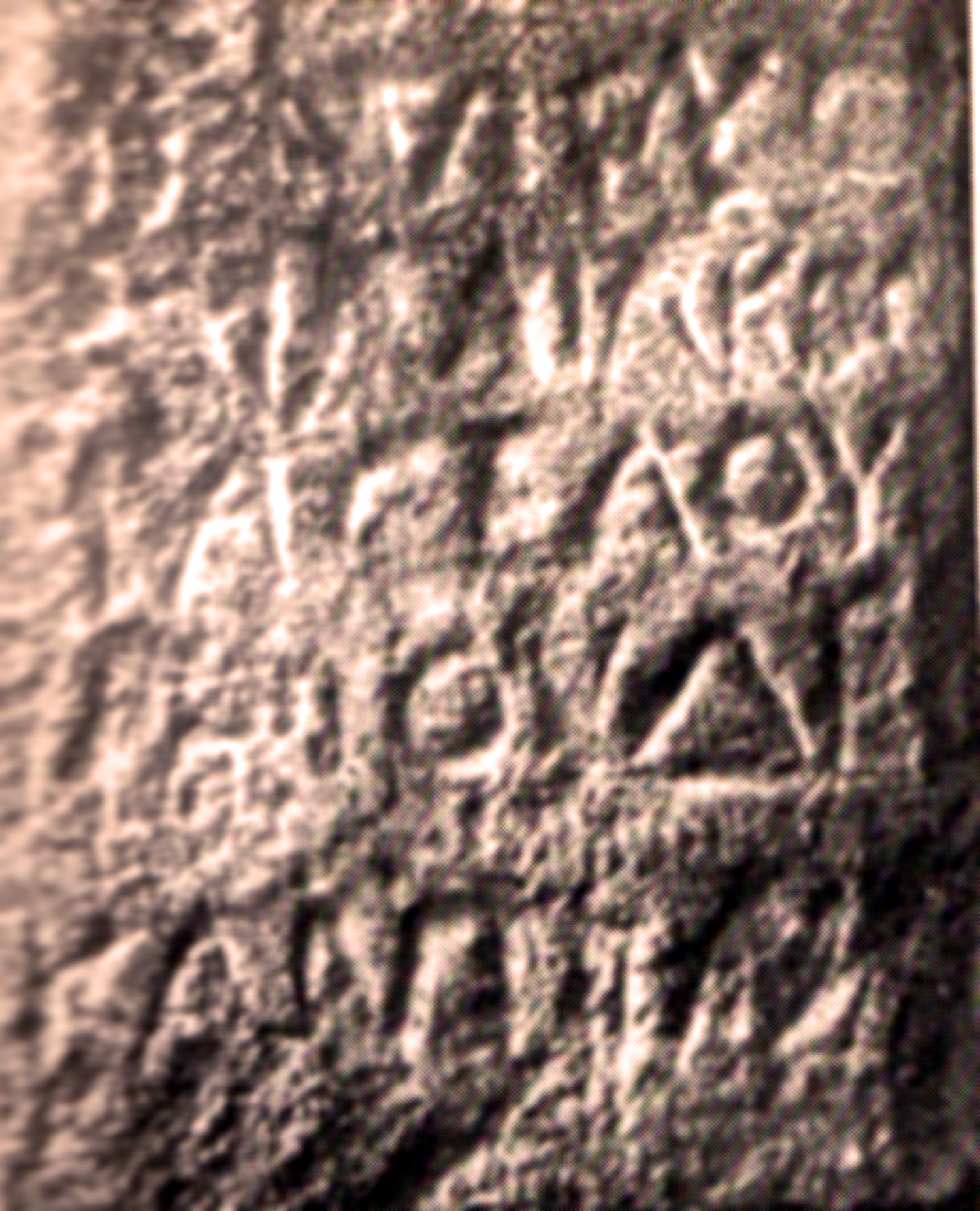 Moulage de l'inscription celto-grecque du Groseau